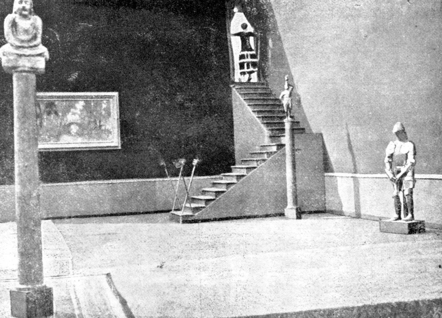 Una scenografia di Enrico Prampolini per Perfido incanto - regia di Anton Giulio Bragaglia 1917 - produz "Novissima Film" Roma